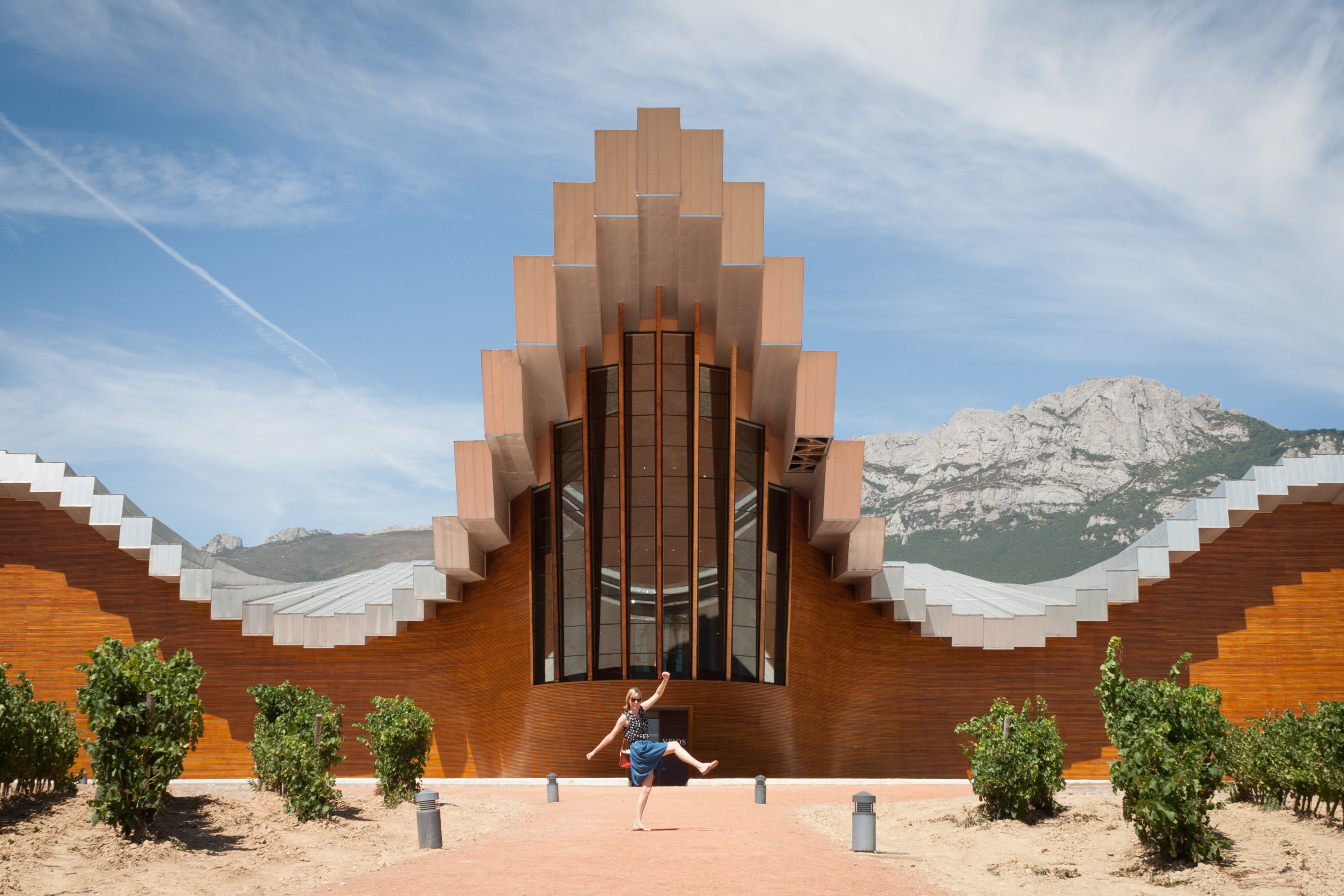 Carla rocks Rioja